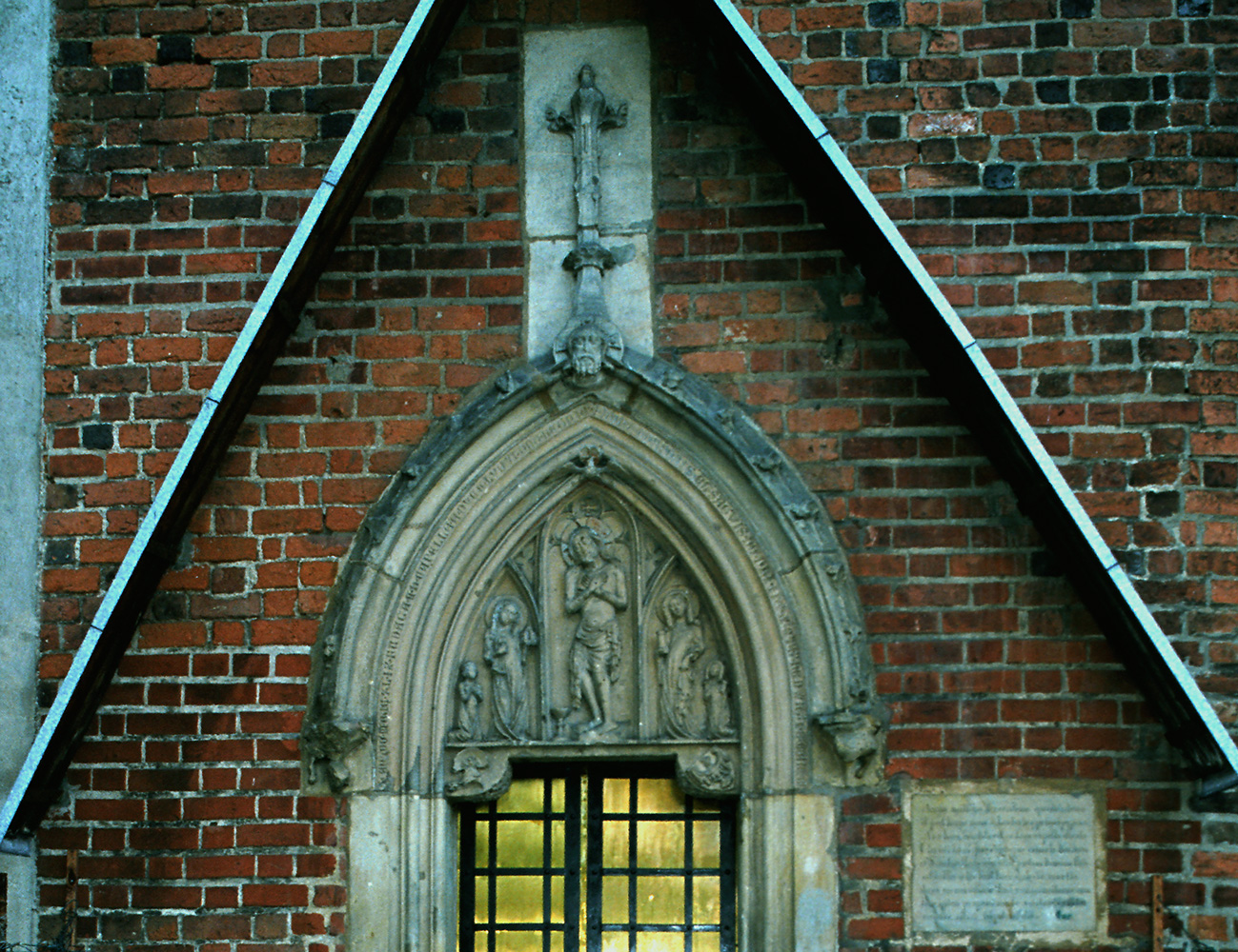 Lubin, kaplica zamkowa